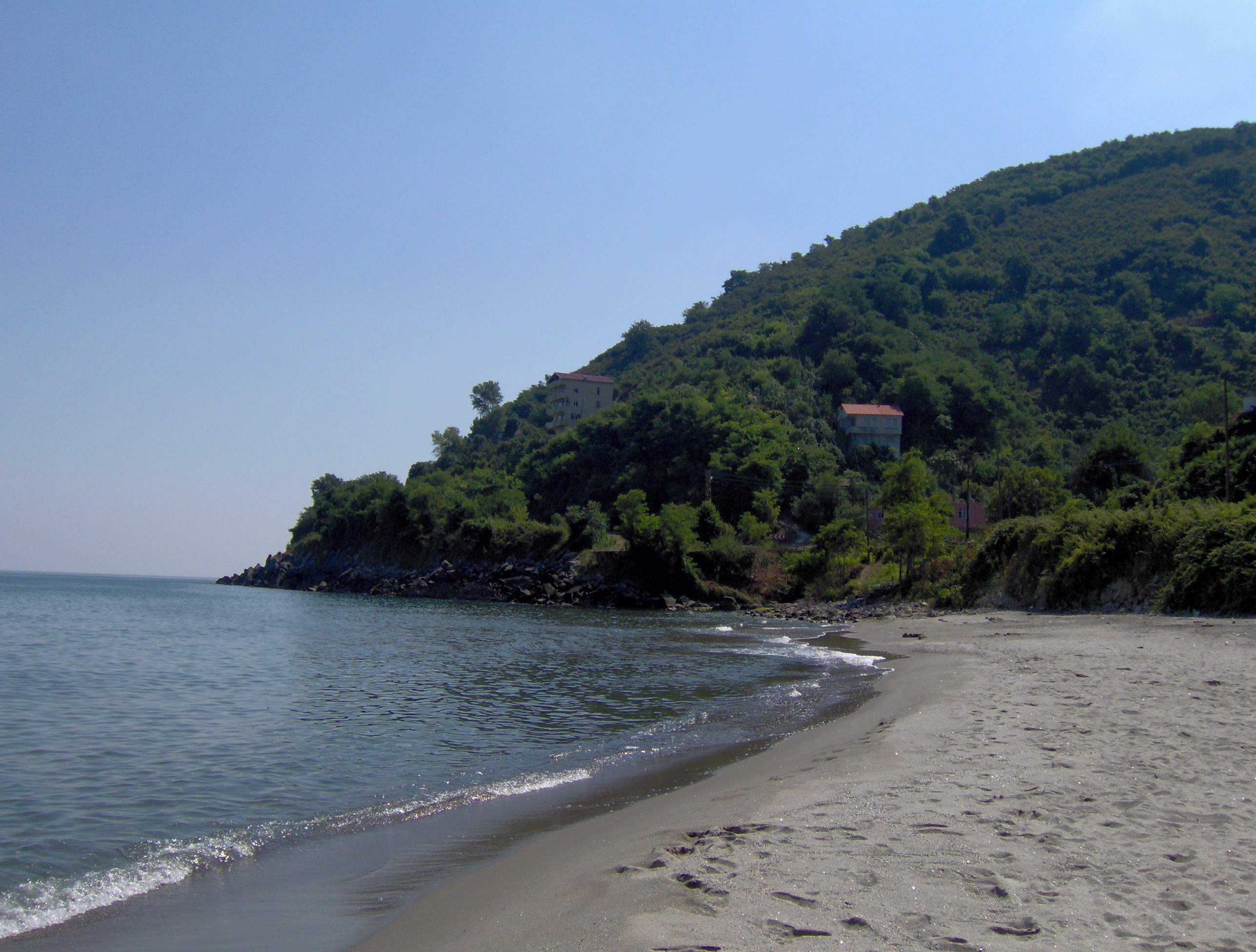 Eynesil sahili